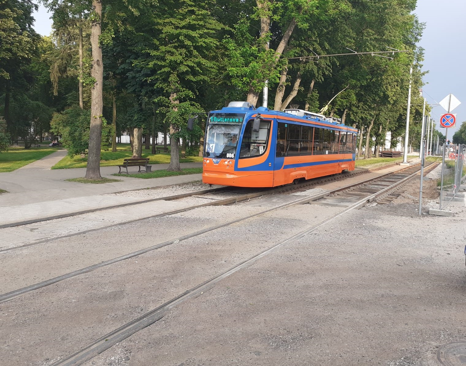 1. maršruta tramvajs Vienības ielā (netālu no pieturvietas "Vienības nams").